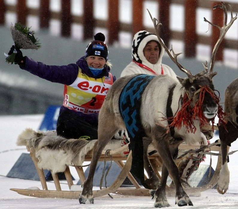 Кайса Мякяряйнен катается на оленях после победной гонки преследования на чемпионате мира по биатлону 2011